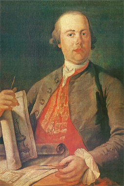 Porträt Benedikt Henrici